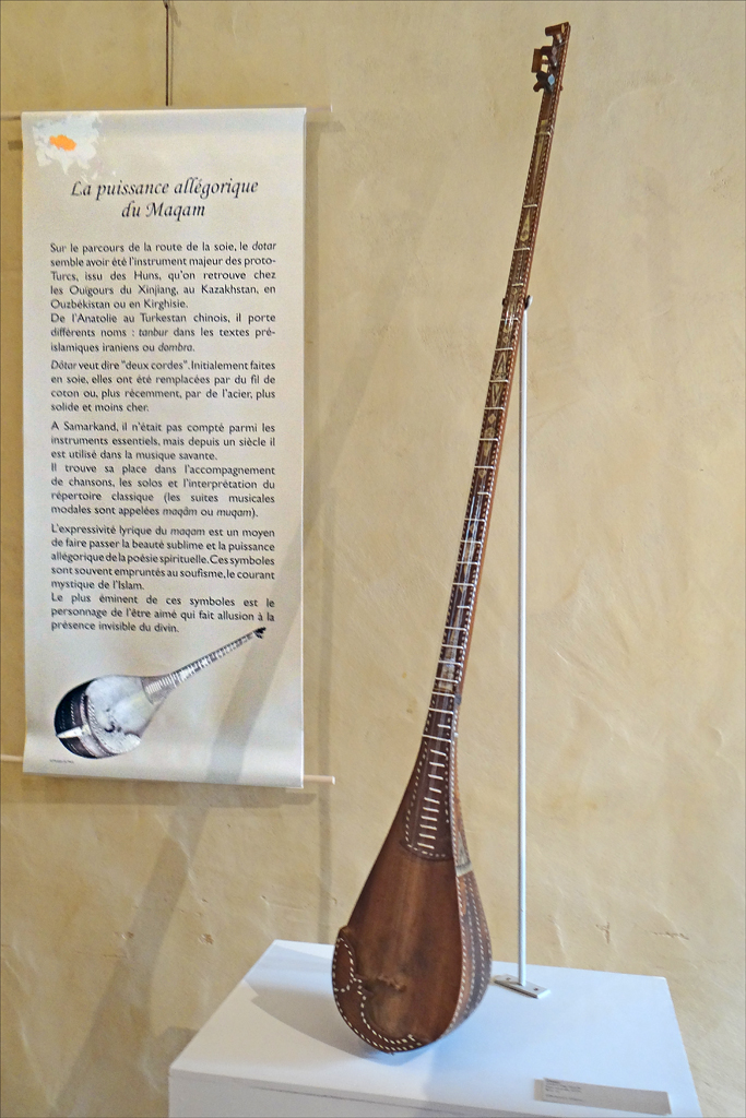 Dotar (Luth à long manche) Asie centrale XXè siècle bois, os Collection J.-L. Charnoz CPFI (Centre du Patrimoine de la Facture Instrumentale) Instrument présenté dans l'exposition : "Musiques et rituels du monde" Instruments et objets sacrés Abbaye de Saint-Florent-le-Vieil dans le cadre du festival les Orientales Exposition conçue par le CPFI, en collaboration avec le Carré Platagenêt, musée d'archéologie de la ville du Mans et en partenariat avec le centre de documentation de la maison des cultures du monde à Vitré.